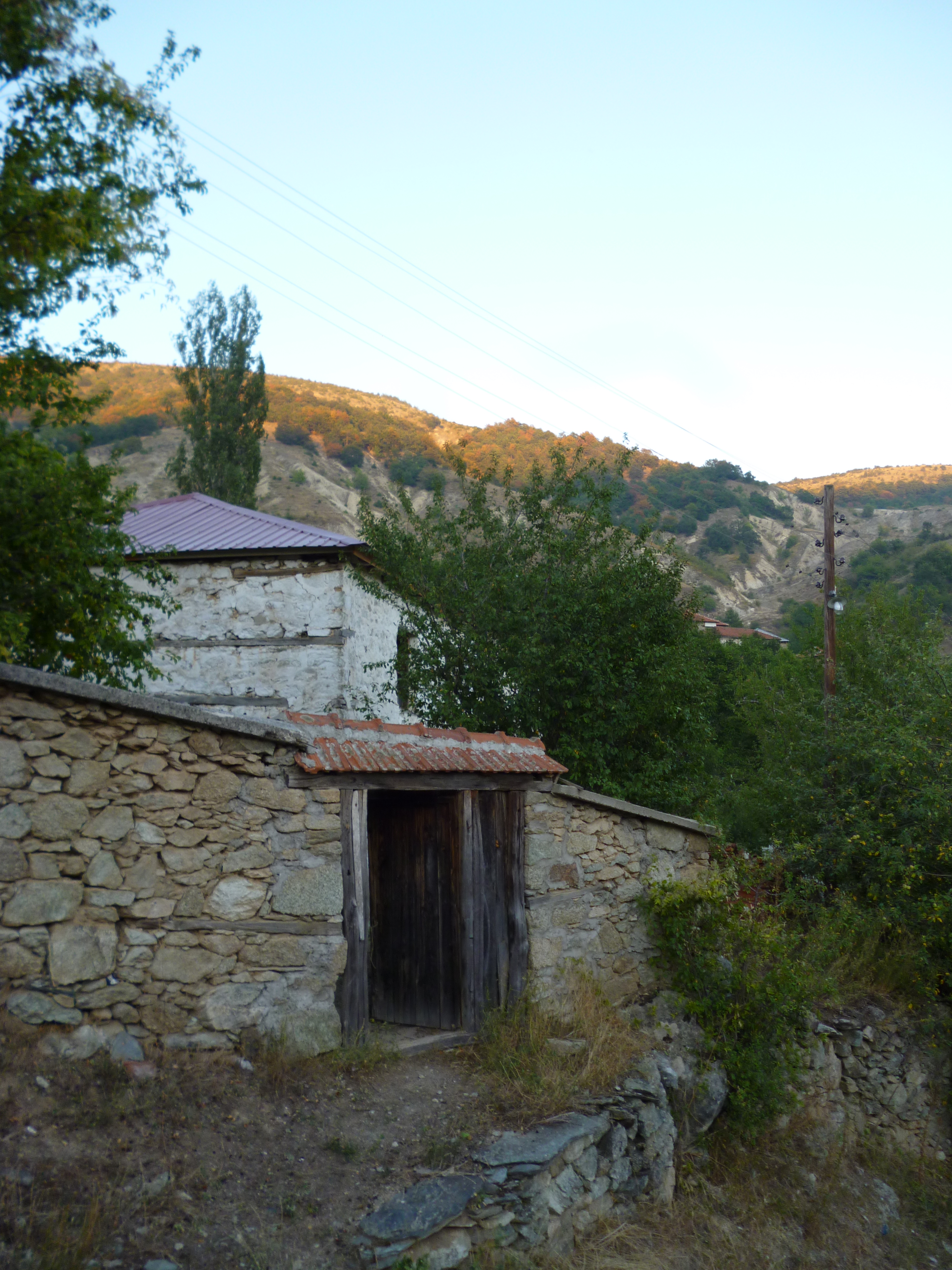 Gorno Divjaci